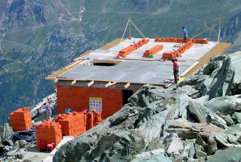 Il Rifugio degli Angeli al Morion in costruzione. Valghisenche